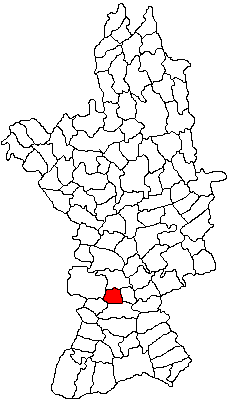 Categorie:Hărţi ale judeţului Olt